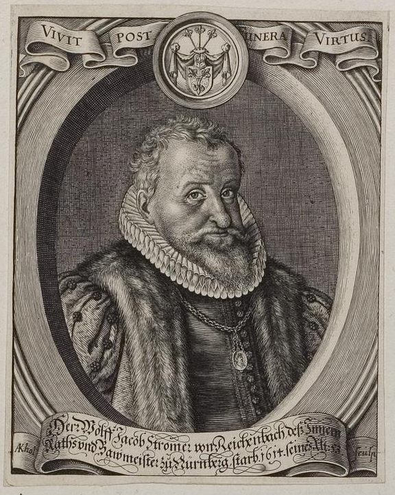 Grafik aus dem Klebeband Nr. 3 der Fürstlich Waldeckschen Hofbibliothek Arolsen Motiv: Jakob Wolfgang Stromer von Reichenbach (1561–1614), Ratsbaumeister der Stadt Nürnberg